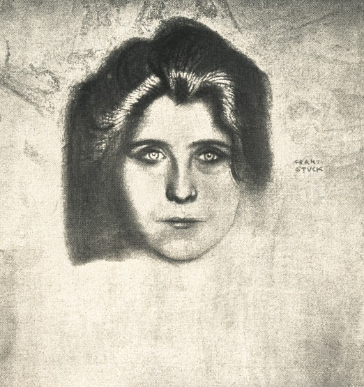 Porträt der Schriftstellerin Juliane Déry von Franz von Stuck